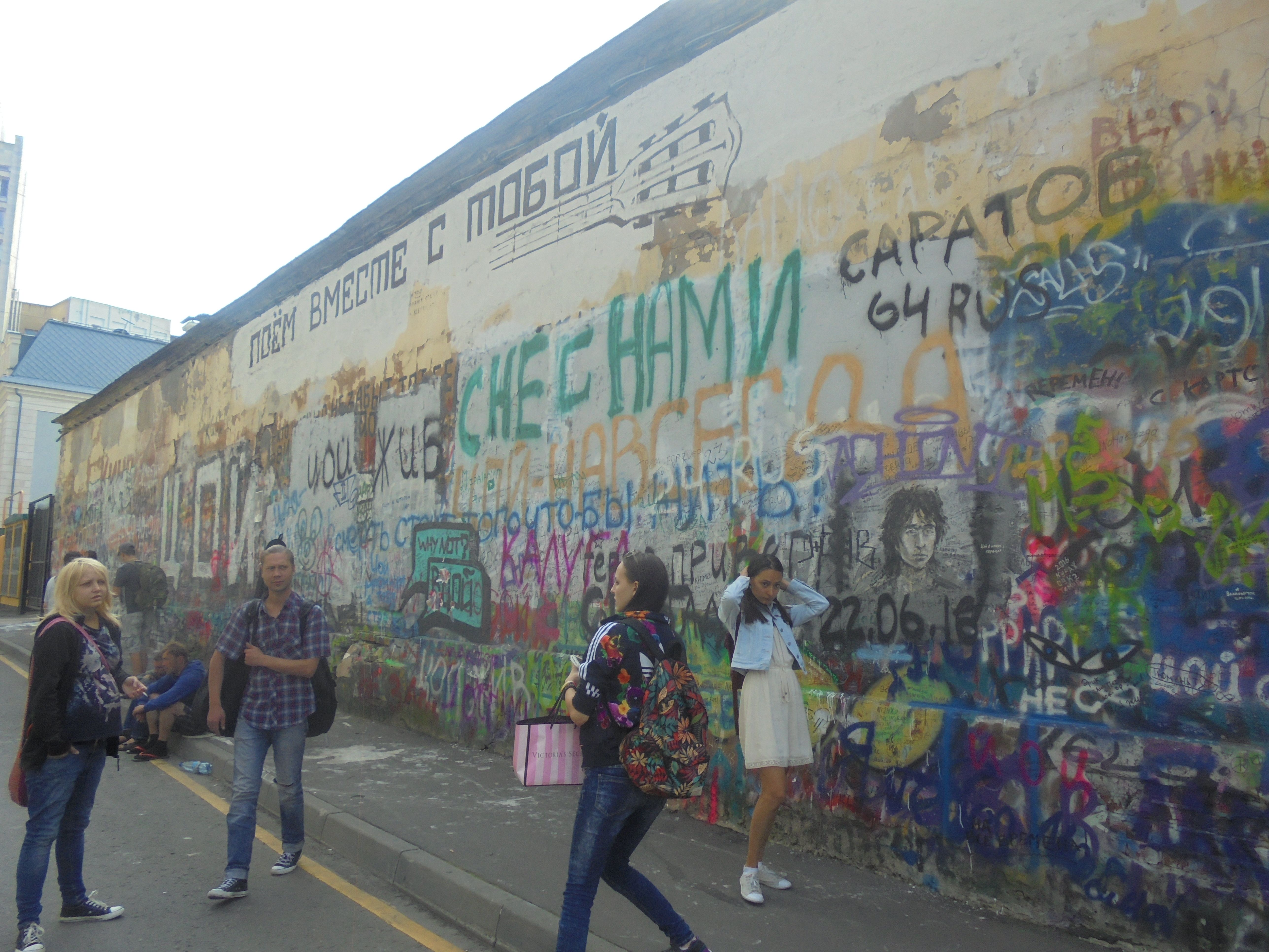 Цой